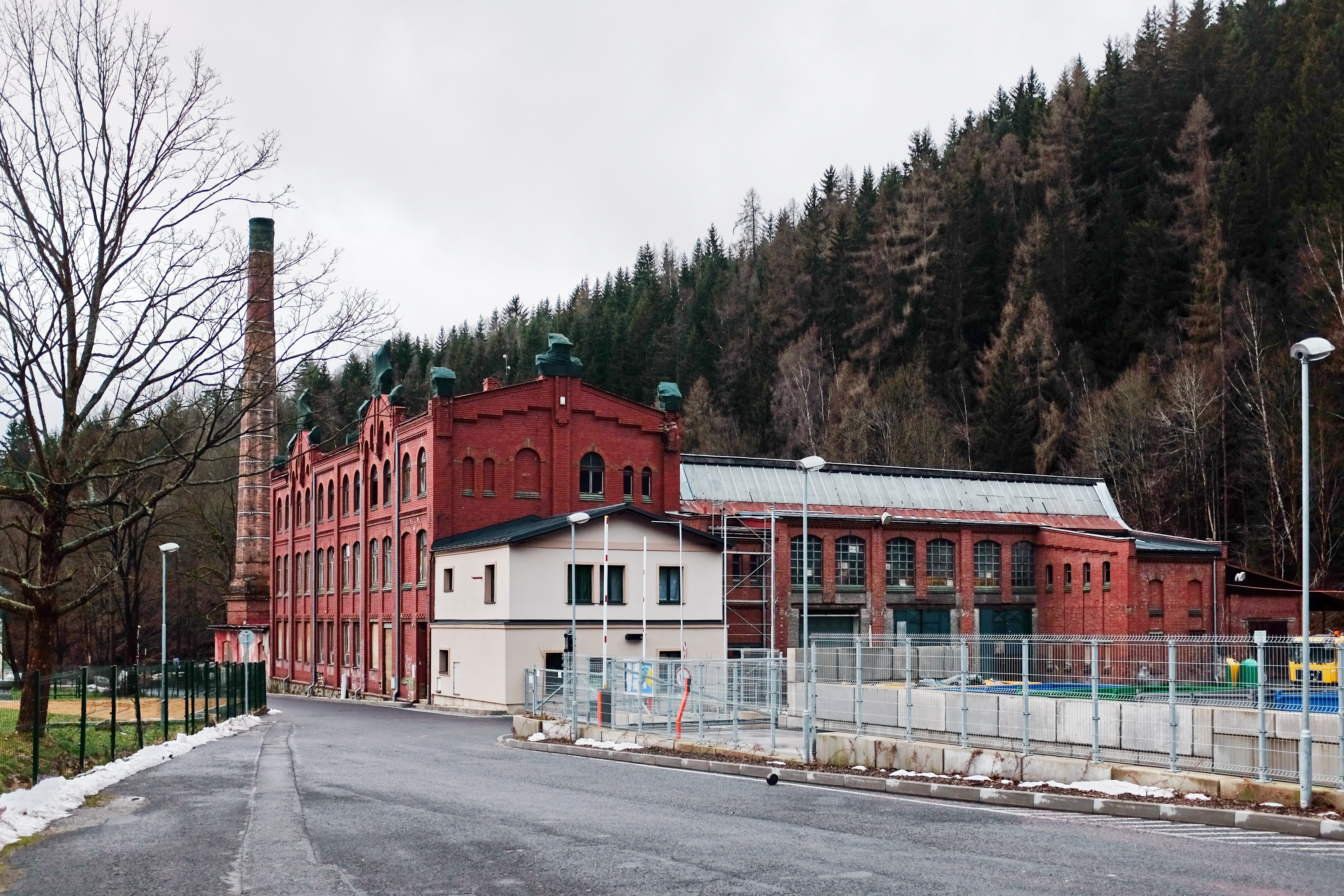 Bývala továrna na výrobu hudebních nástrojů Bohland a Fuchs, Lipová cesta 625/19, Kraslice (okres Sokolov).